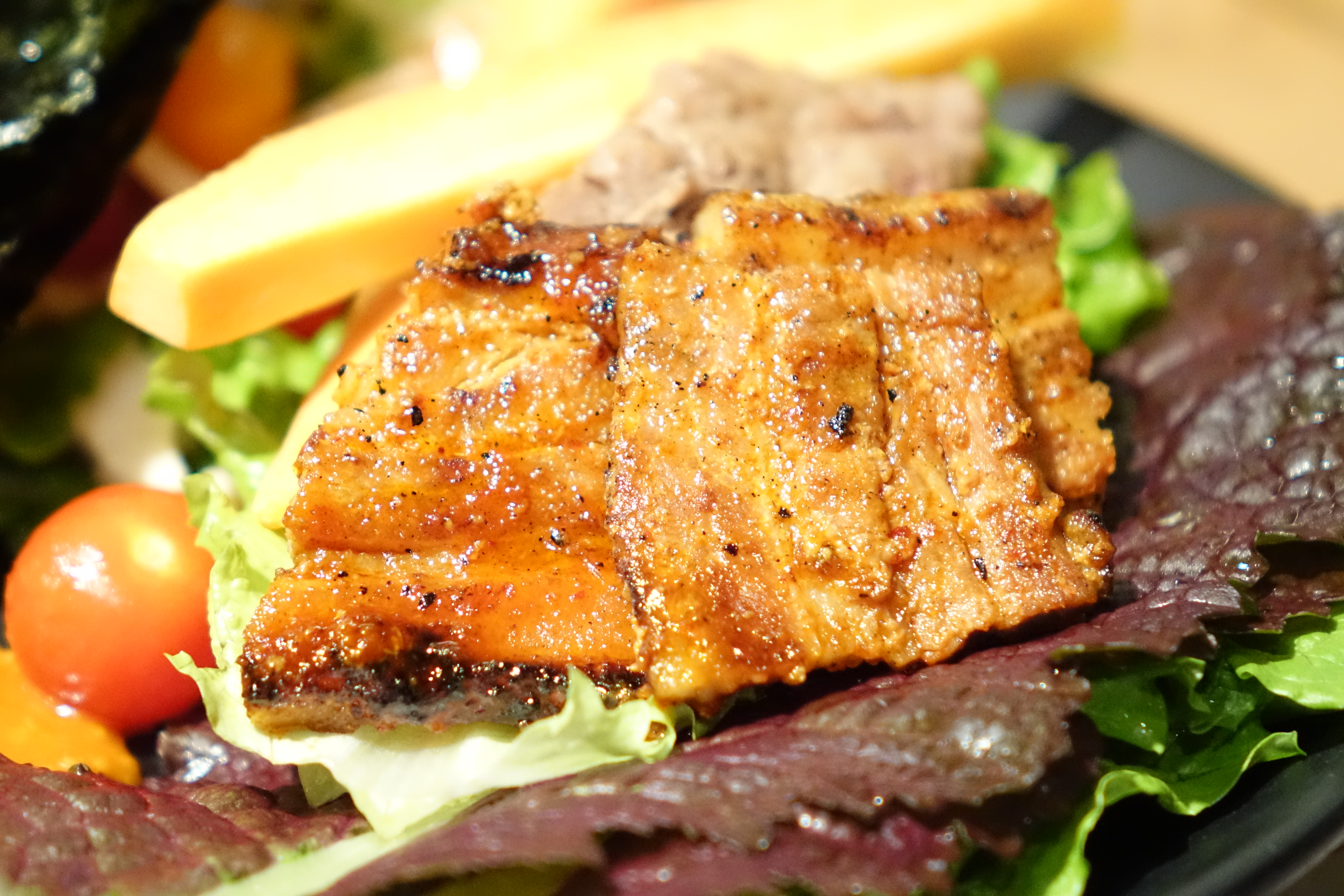 삼겹살과 상추쌈, 2015년 3월 계절밥상 인사동점